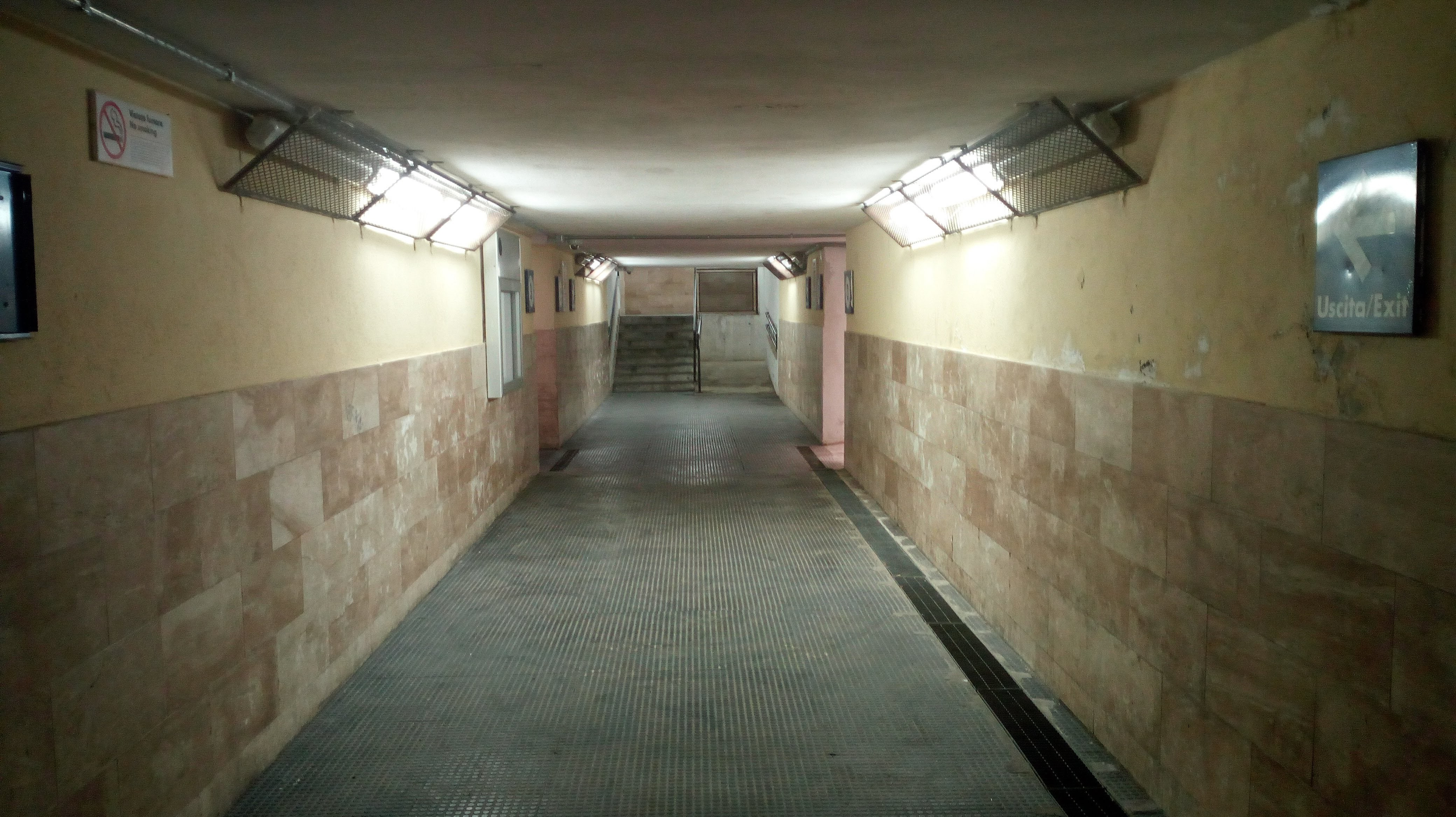 Il sottopasso della stazione ferroviaria di Elmas.